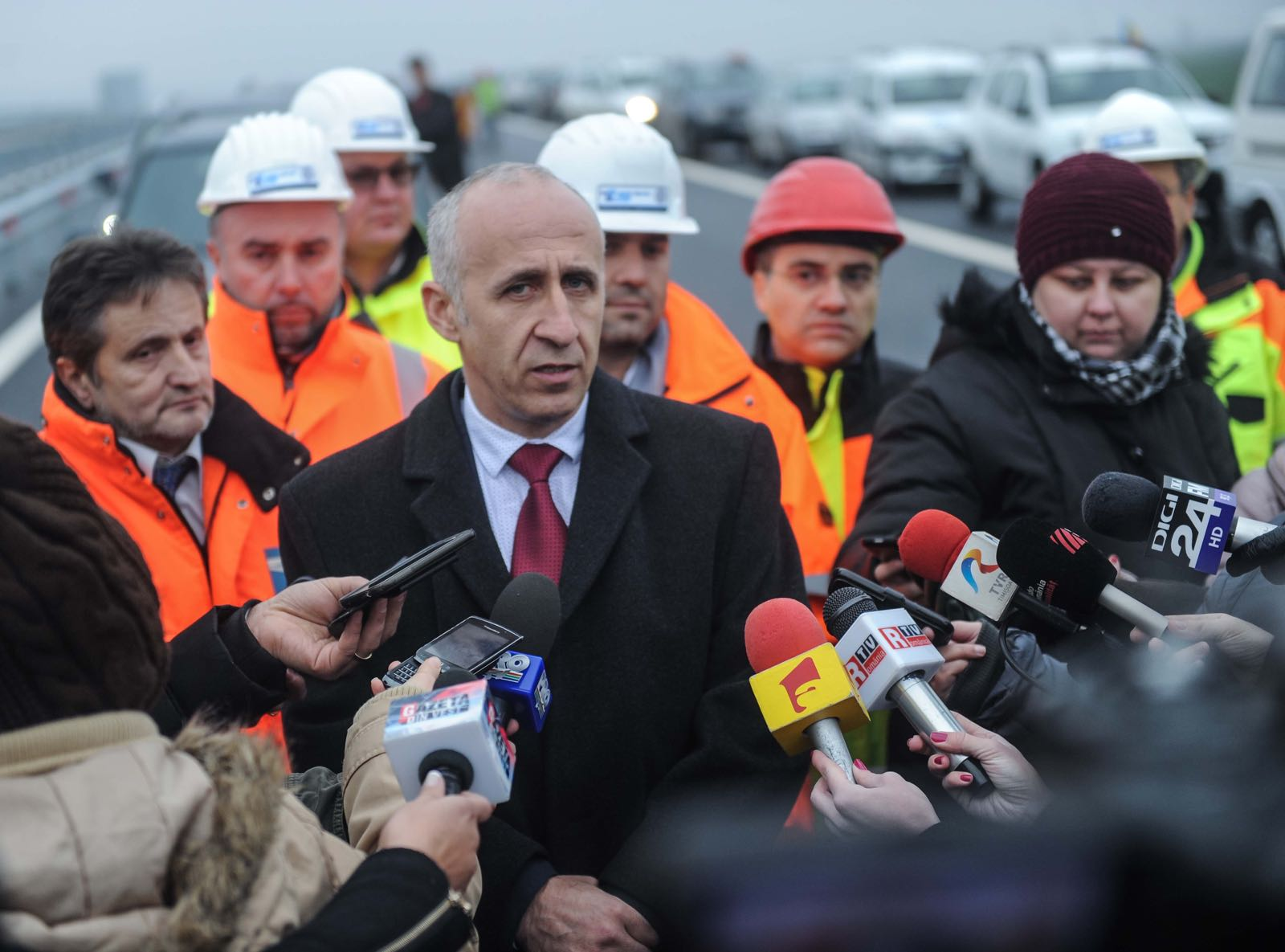 Inaugurarea tronsonului de Autostrada Lugoj-Timișoara, 22 km